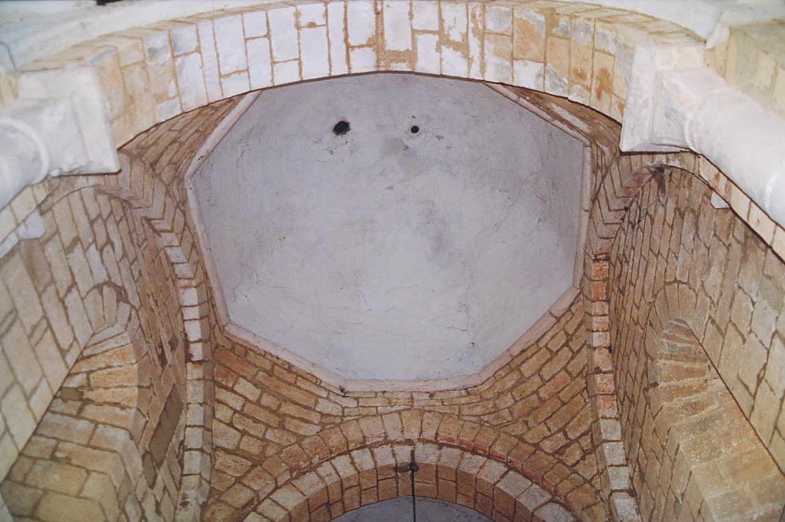 coupole octogonale de l'église Saint Bonnet (Commune de Gignac Lot)